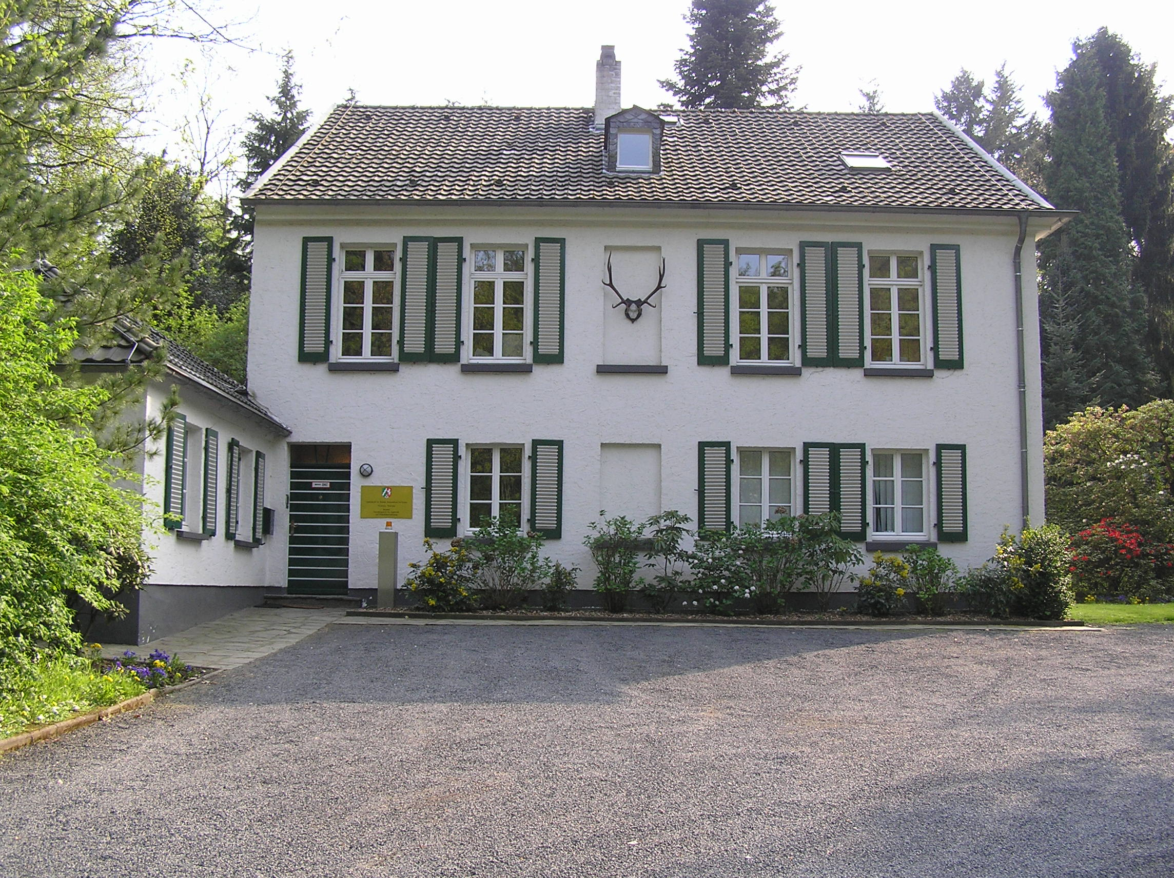 Forschungsstelle für Jagdkunde und Wildschadenverhütung auf dem Ennert, Forsthaus Hardt, Pützchens Chaussee 228, Bonn-Küdinghoven